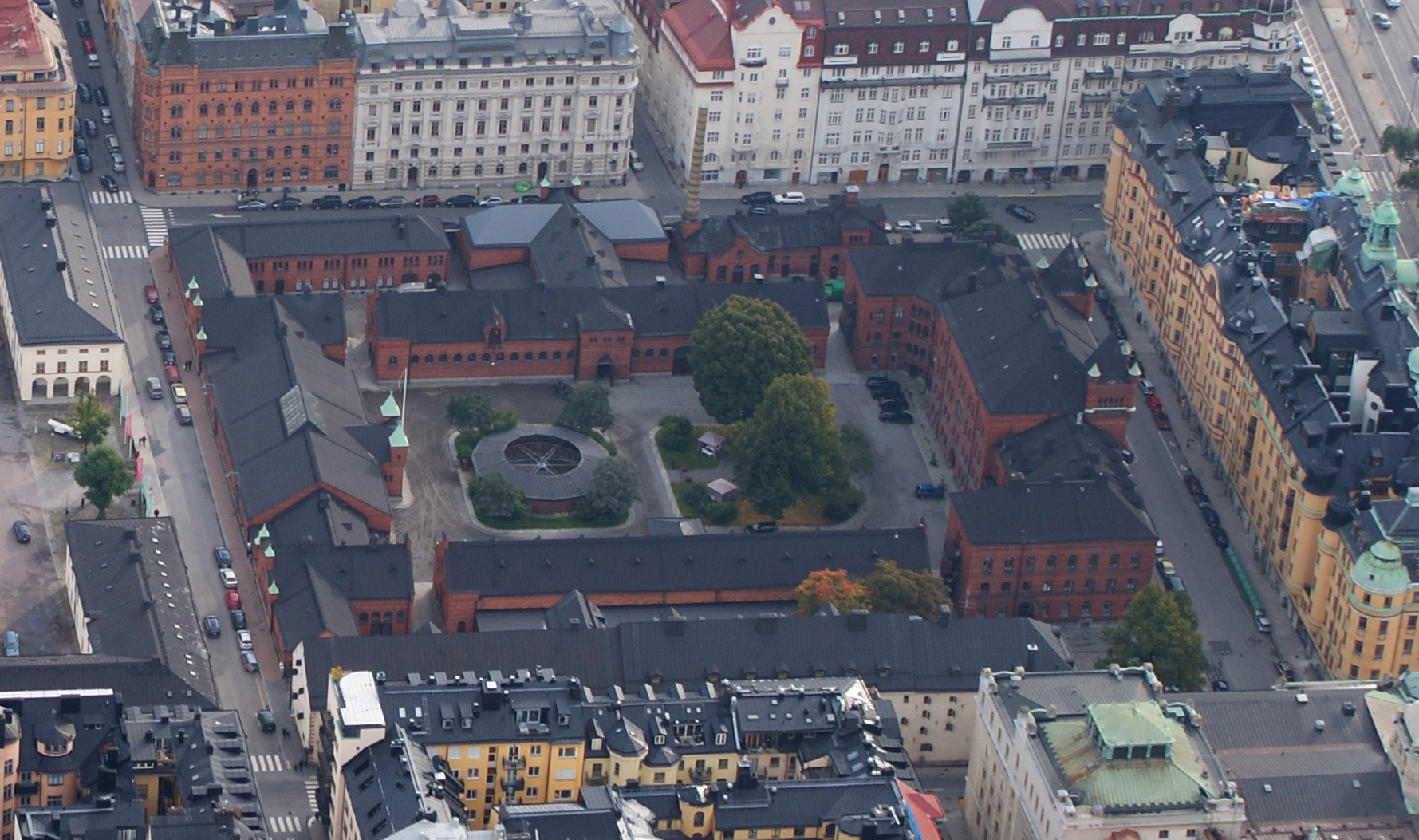 sedd från helikopter.